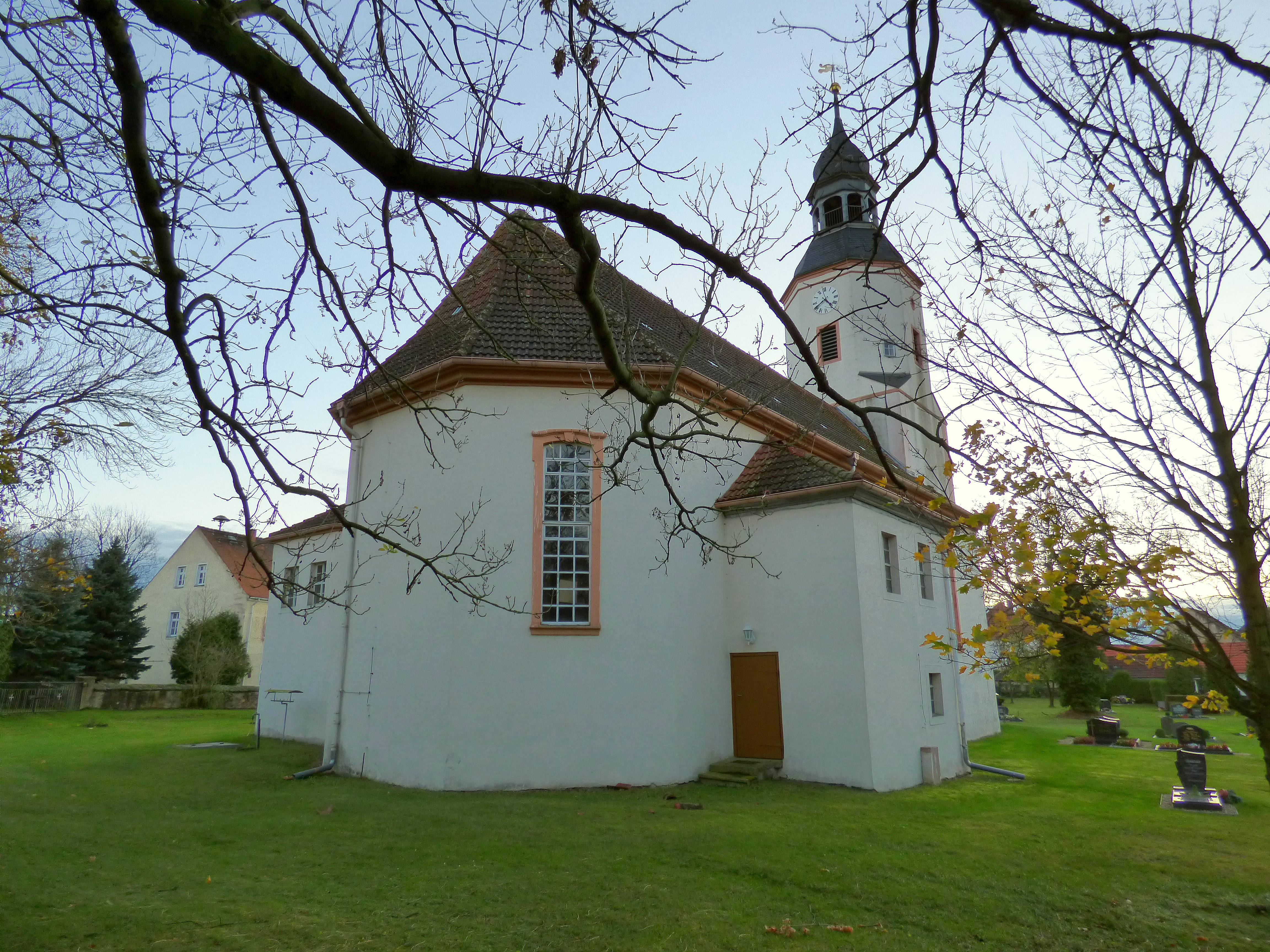 Ostansiicht mit Sakristei der Dorfkirche Fichtenberg (Mühlberg/Elbe)